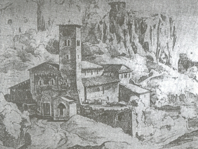 Particolare di una stampa di E. Fries del 1826 che illustra la Basilica Romanica di Sant'Elia a Castel Sant'Elia (Viterbo)